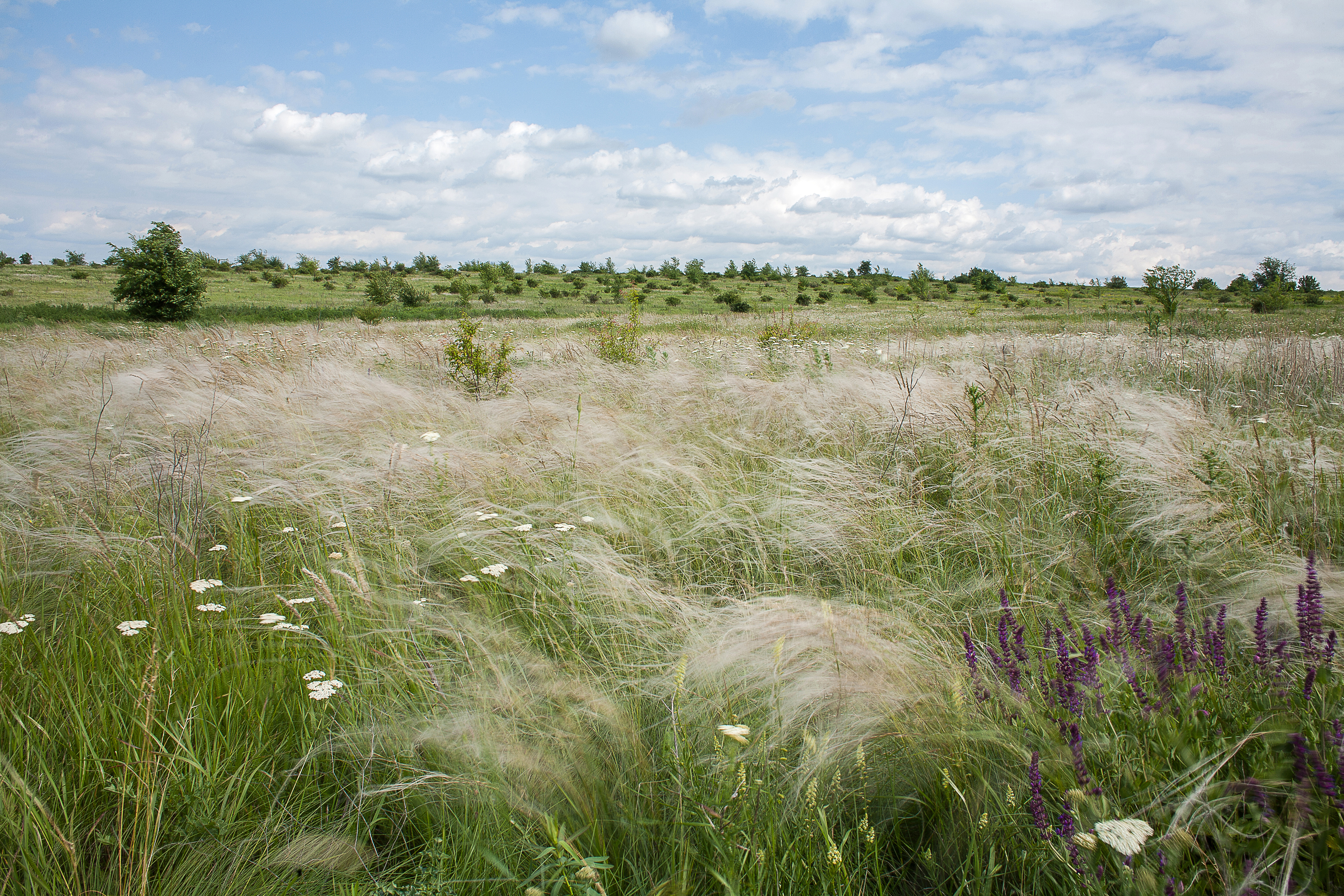 Єланецький степ, Єланецький, Новоодеський р-ни